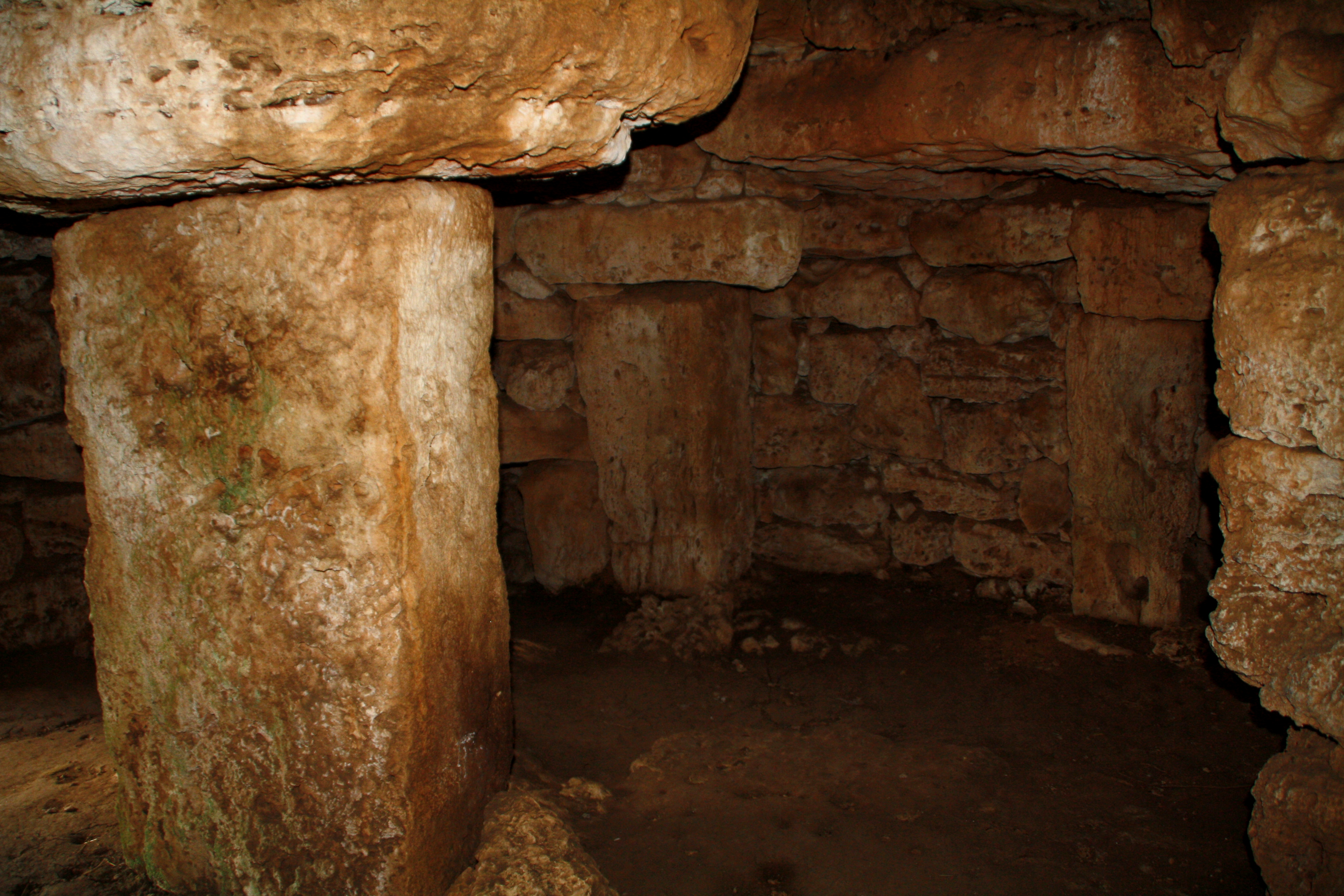 Inneres eines überdachten Bereichs in Talatí de Dalt, Menorca.